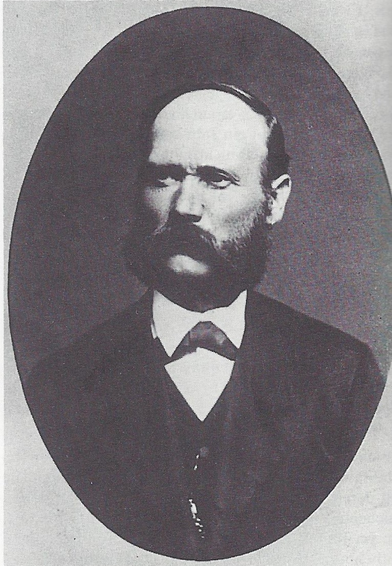 Porträtfotografie des Orthopäden Georg Joachimsthal (1863-1914)